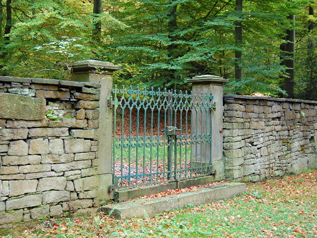 eisernes Eingangstor der Erbbegräbnisstätte Schede, Herdecke; Blick aus dem Inneren der Anlage nach außen This is a photograph of an architectural monument.